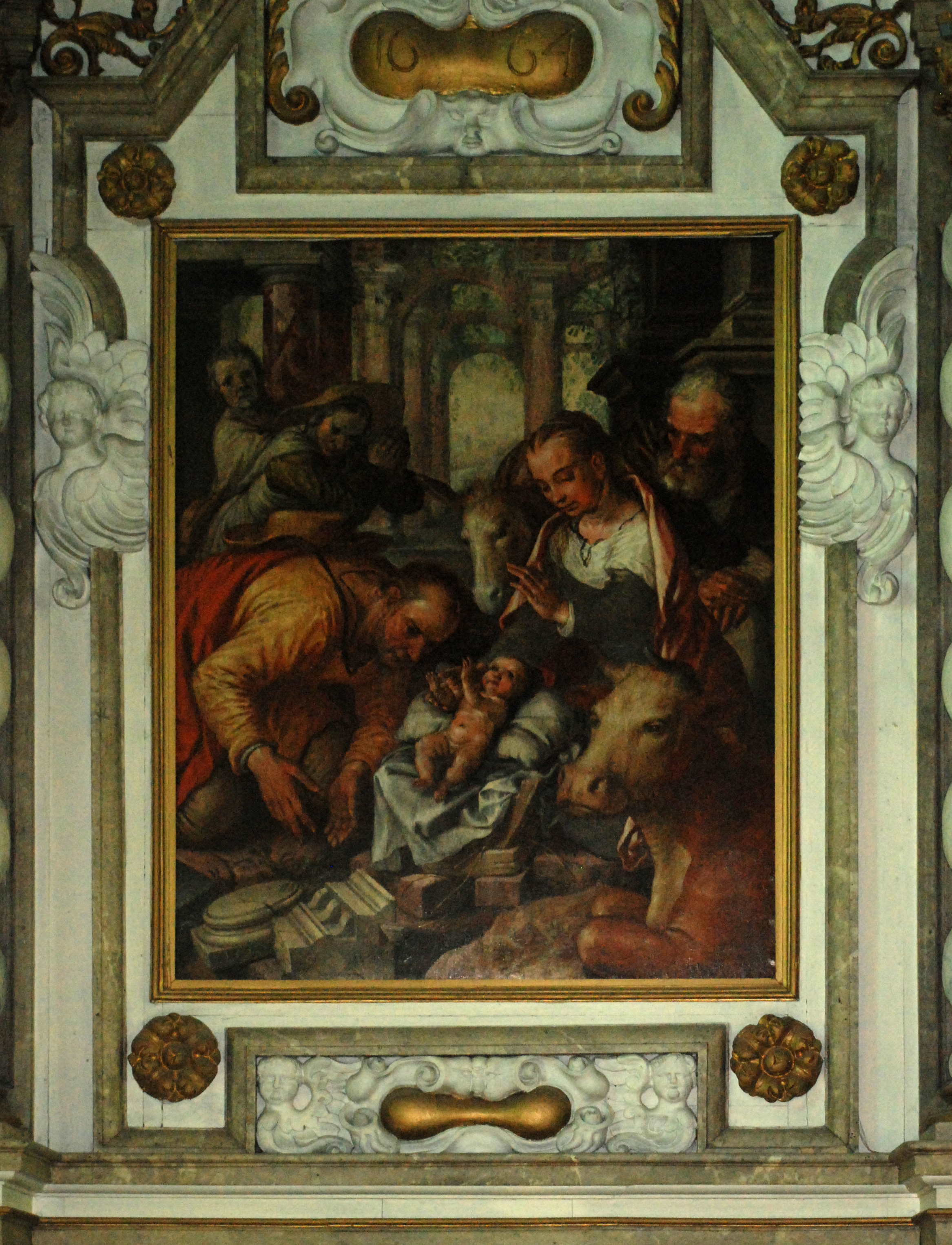 Belgique - Brabant wallon - Église de Court-Saint-Étienne